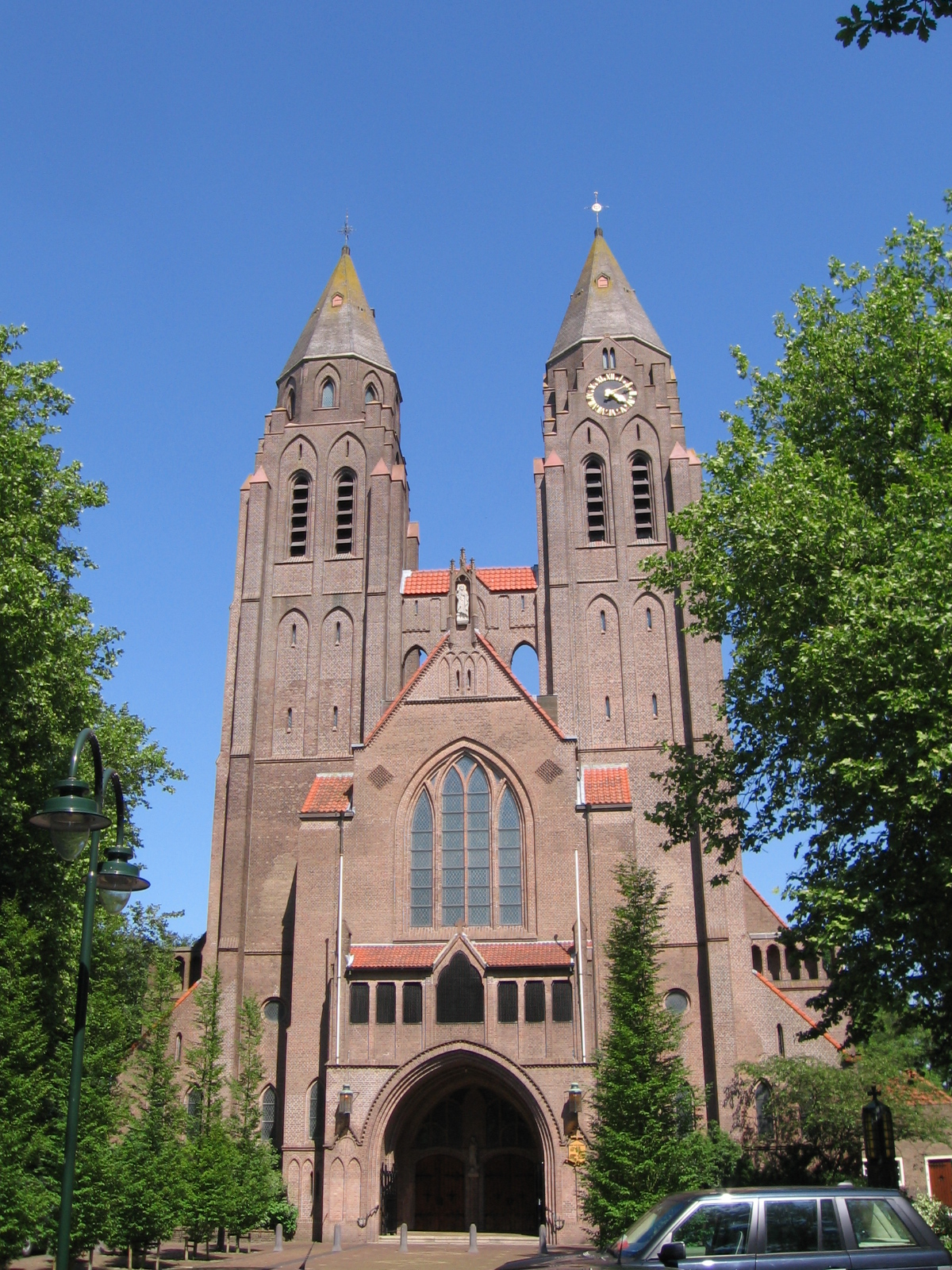 Laren, juni 2006